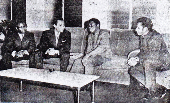 Dans le salon du Palais du peuple, le commandant Marian Ngouabi en présence de notre chargé d'Affaires en RPC et de M. Lopes, ministre de l'Education de la RPC.